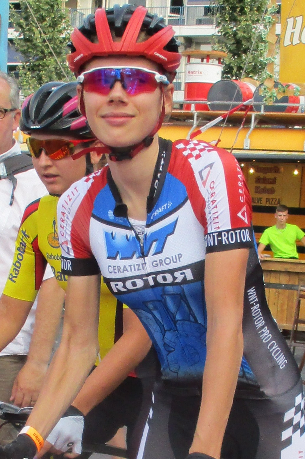 Criterium RaboRonde in Heerlen, Limburg, vrijdag 3 augustus 2018